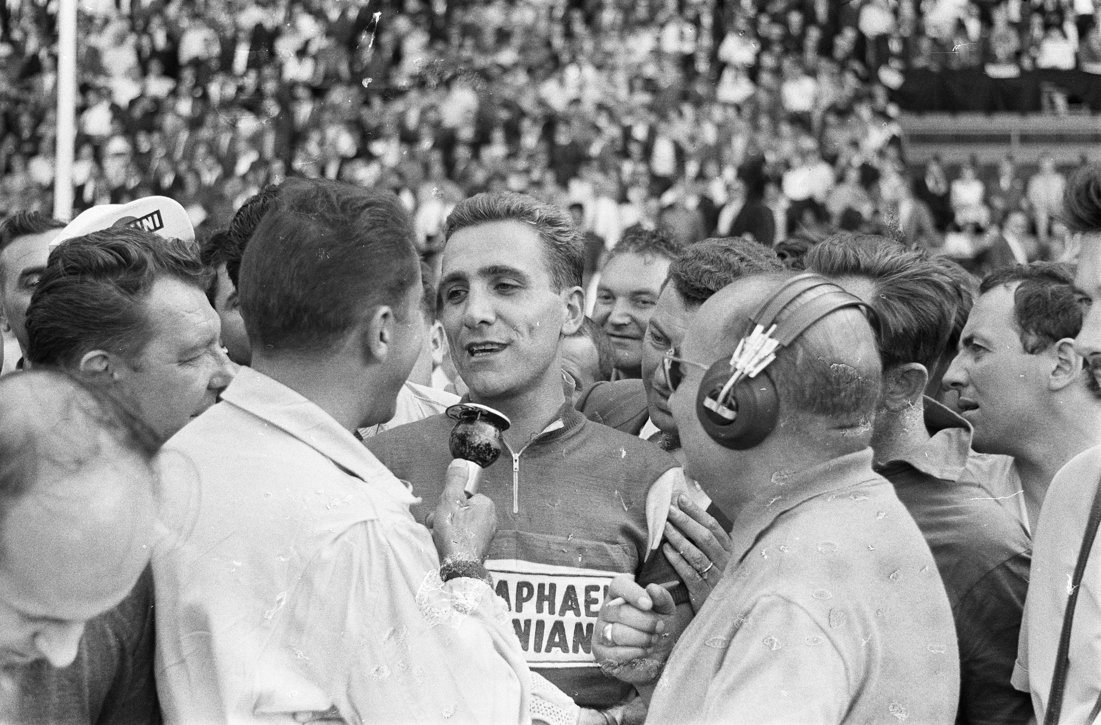 Collectie / Archief : Fotocollectie Anefo Reportage / Serie : Tour de France 1960 Beschrijving : Tour de France , Rogier Riviere wordt geinterviewd Datum : 28 juni 1960 Locatie : Frankrijk Trefwoorden : sport, wielrennen Persoonsnaam : Rivière, Roger Instellingsnaam : Tour de France Fotograaf : Harry Pot / Anefo Auteursrechthebbende : Nationaal Archief Materiaalsoort : Negatief (zwart/wit) Nummer archiefinventaris : bekijk toegang 2.24.01.05 Bestanddeelnummer : 911-3763